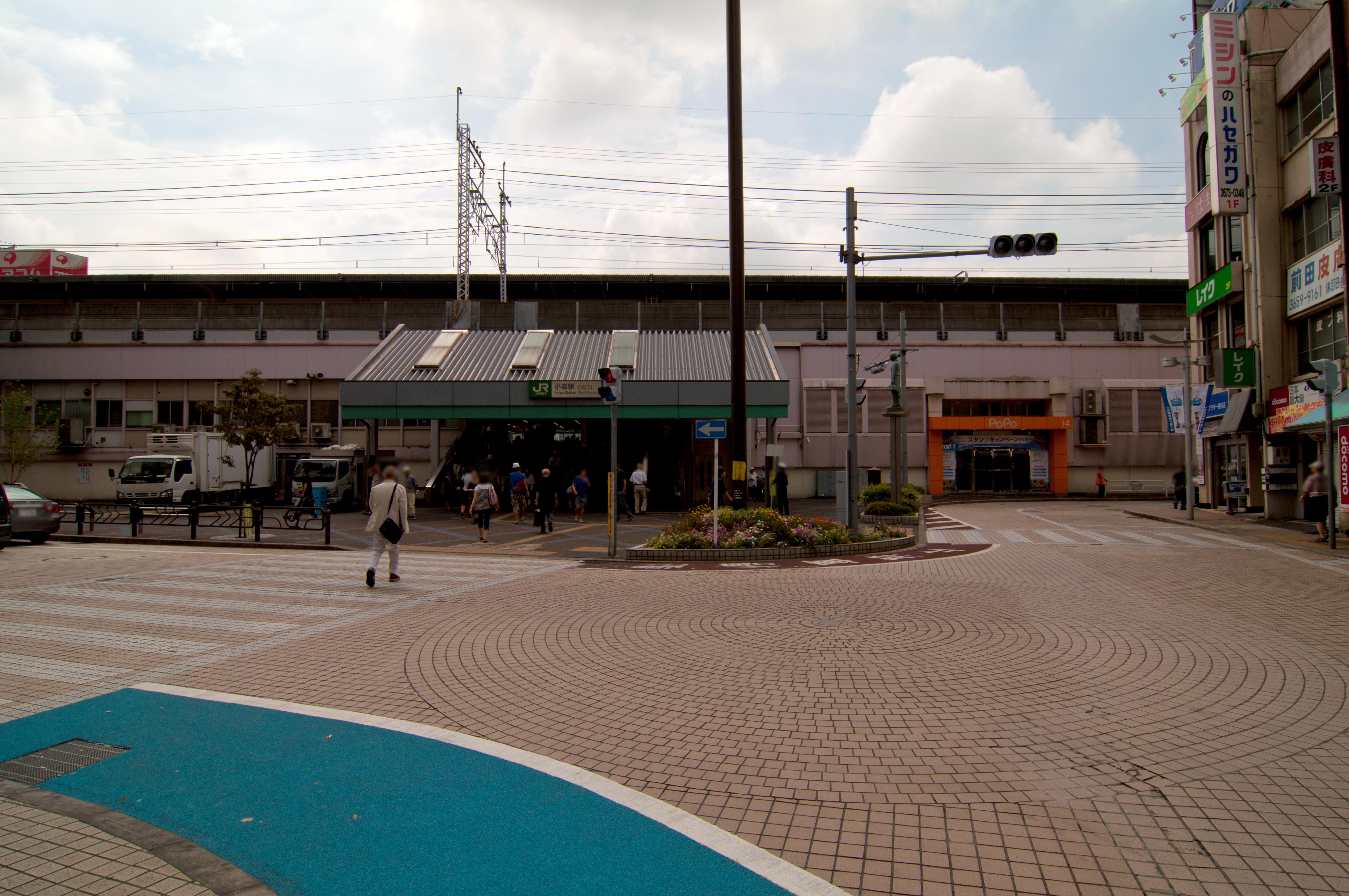 東日本旅客鉄道総武本線小岩駅